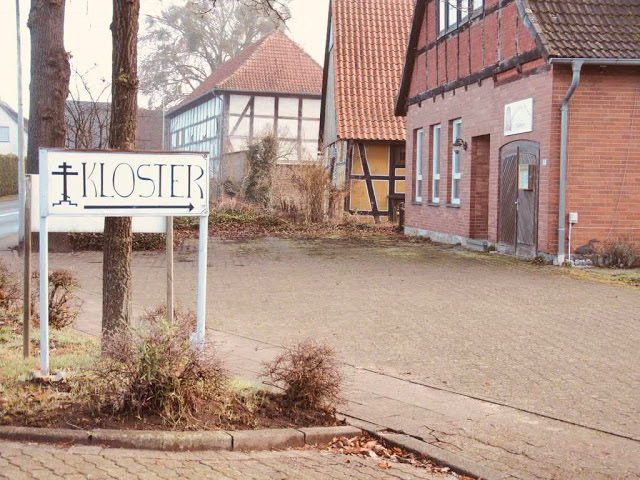 Parkplatz Kloster